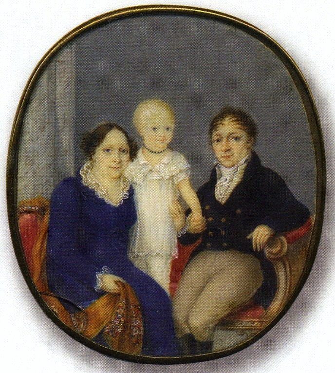 Павел Петрович Пущин с женой Елизаветой Андреевной, ур. Всеволожской и сыном.